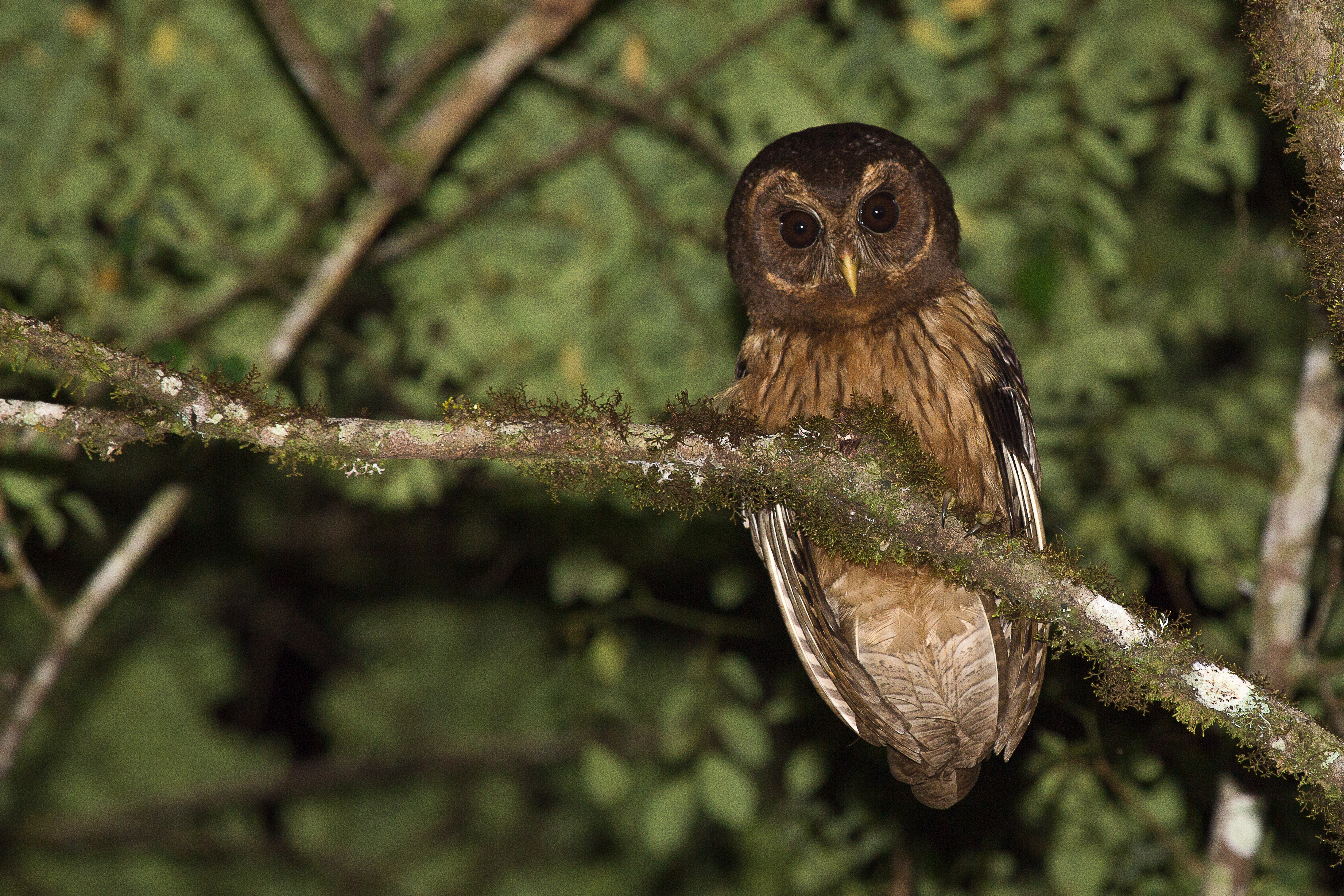 Coruja-do-mato no Parque Estadual Intervales